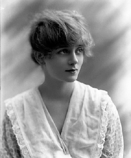 Evelyn Laye